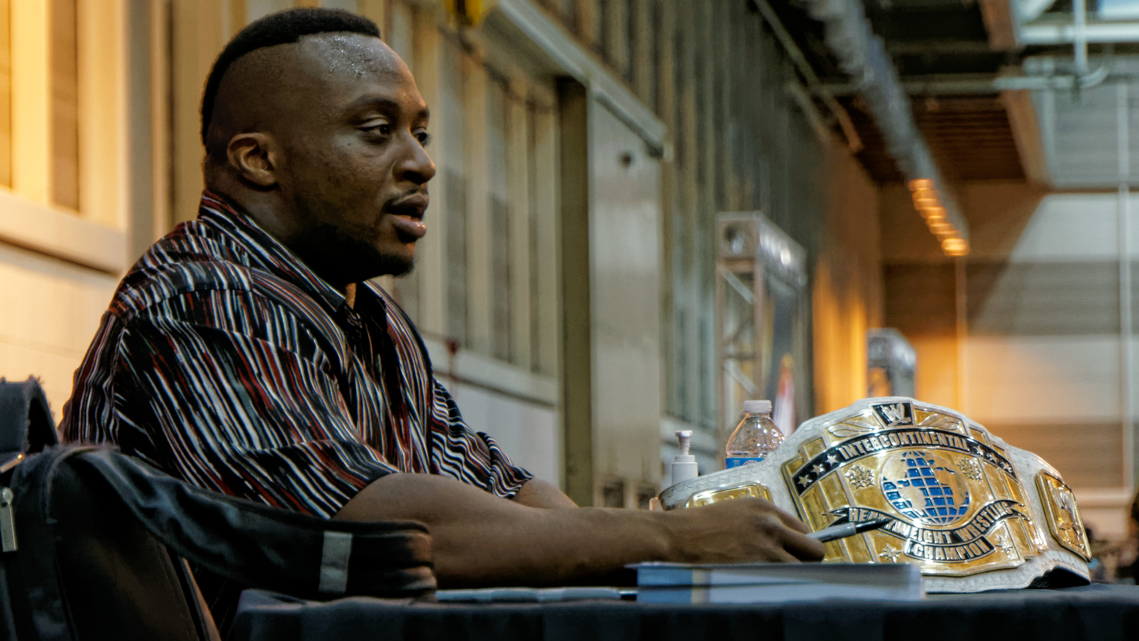 2014-04-03_19-03-38_NEX-6_5847_DxO